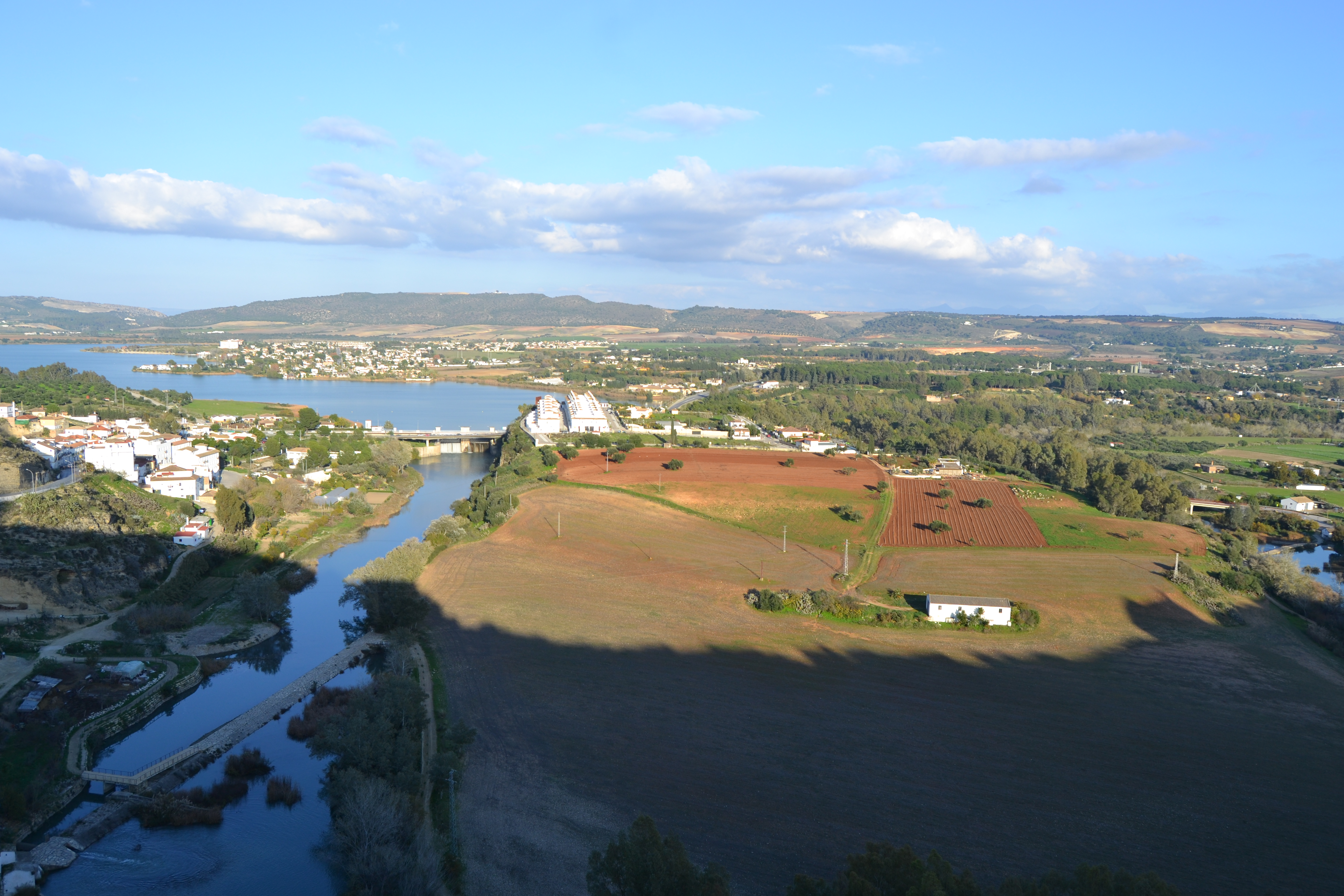 Arcos de la Frontera, Andalucía, España